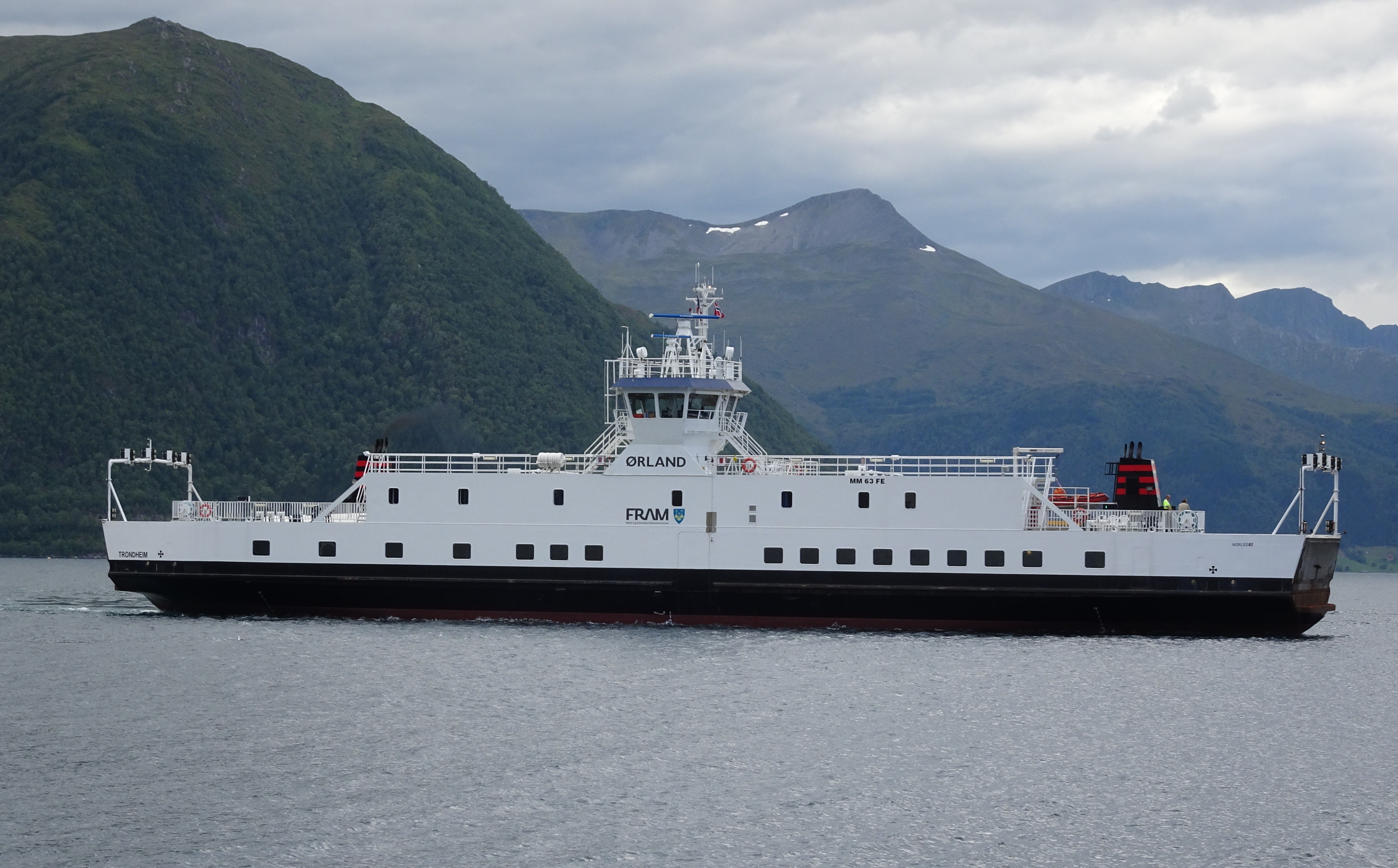 MF Ørland i trafikk mellom Volda og Lauvstad